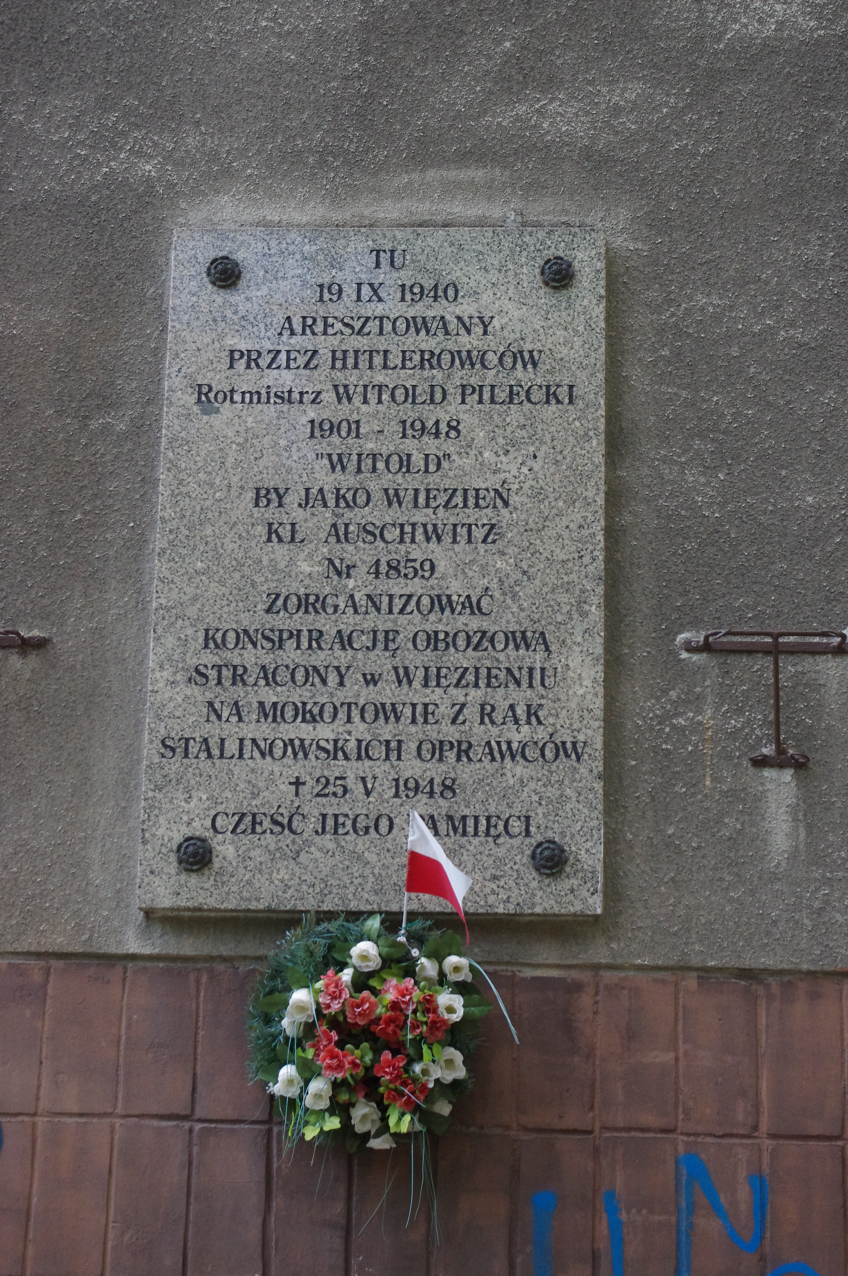 Tablica upamiętniająca Witolda Pileckiego na domu przy al. Wojska Polskiego 40 w Warszawie, gdzie 19.09.1940 r., Witold Pilecki dał się celowo aresztować i wywieźć do obozu KL Auschwitz w celu utworzenia tam podziemia